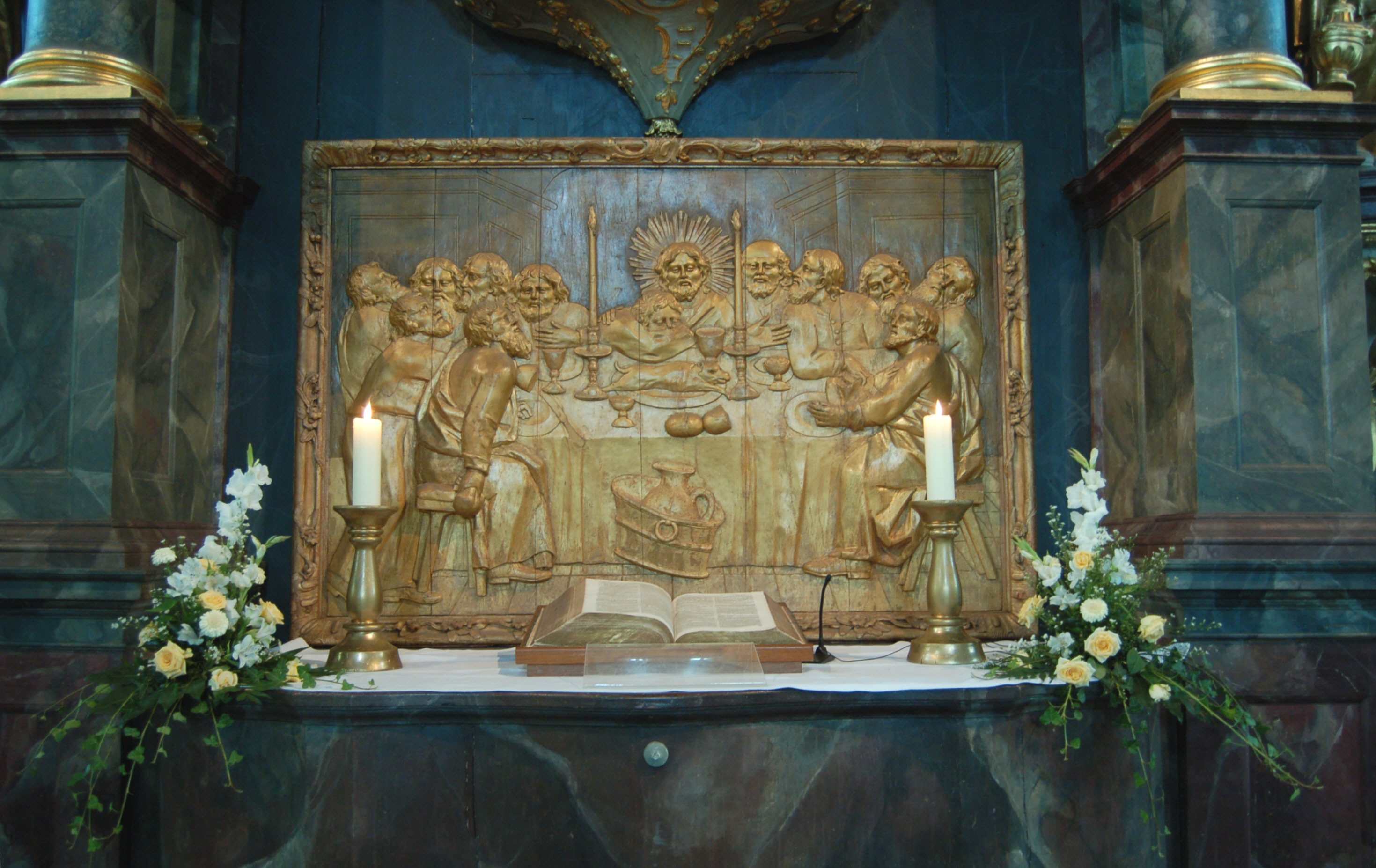 Altarbild der Klosterkirche Uetersen